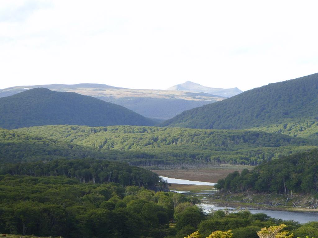 Valley near the Beagle Channel, Tierra del Fuego, Argentina